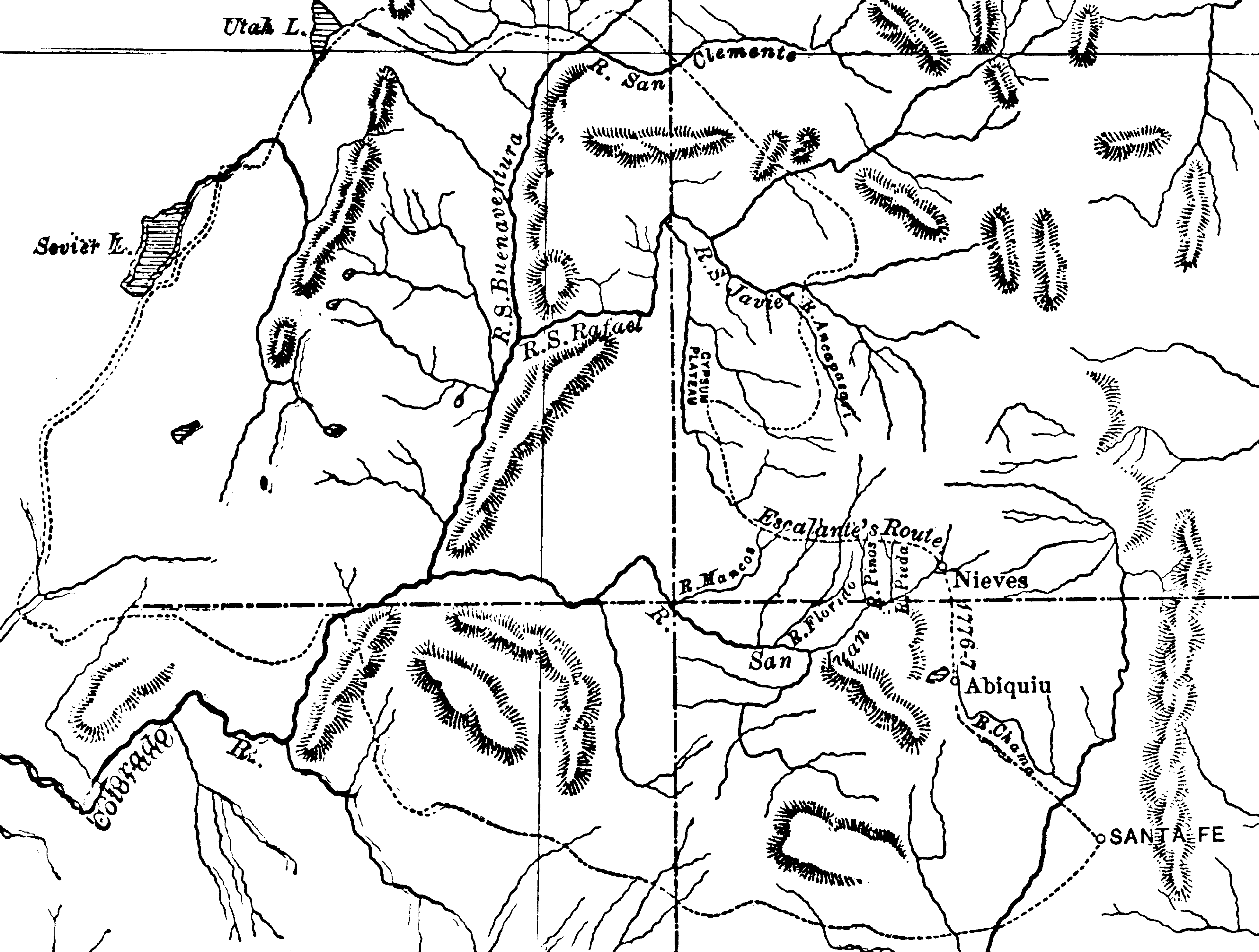 Escalante's Route from Santa Fé to Utah Lake.